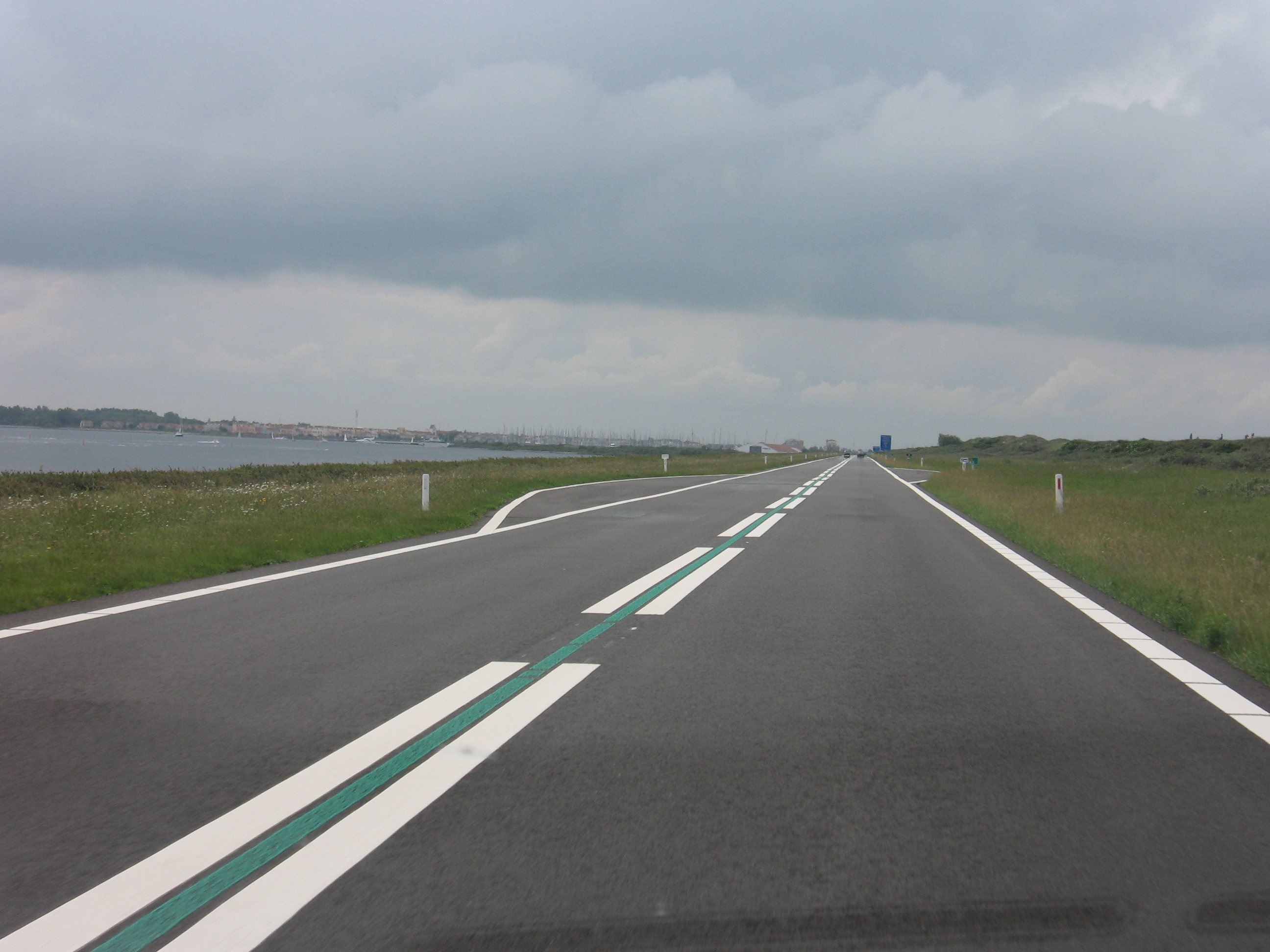 wegmarkering 100 km, groen (N57)